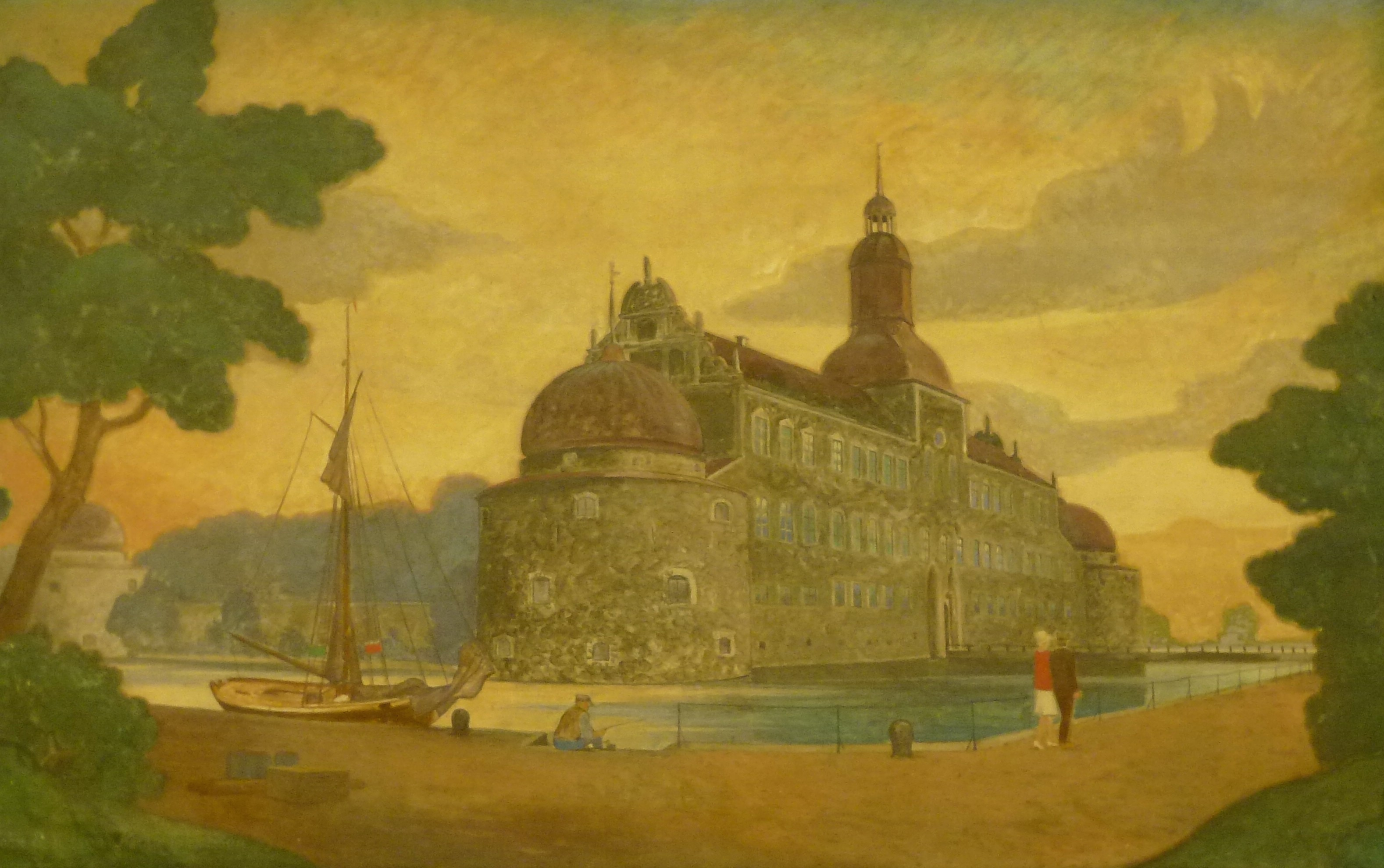 Väggmålning i Stockholm Centralens vänthall: Vadstena slott